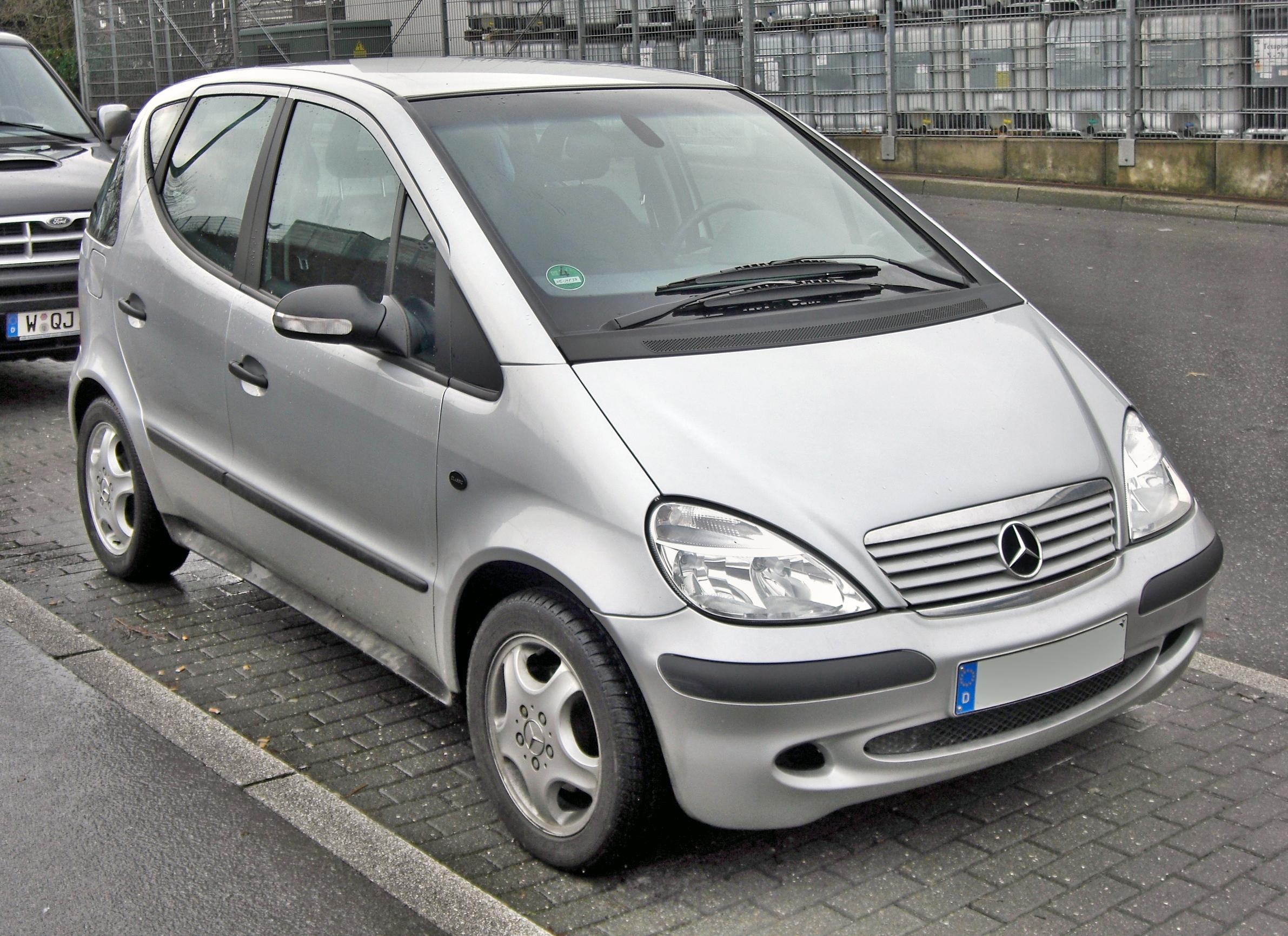 Mercedes A-Klasse